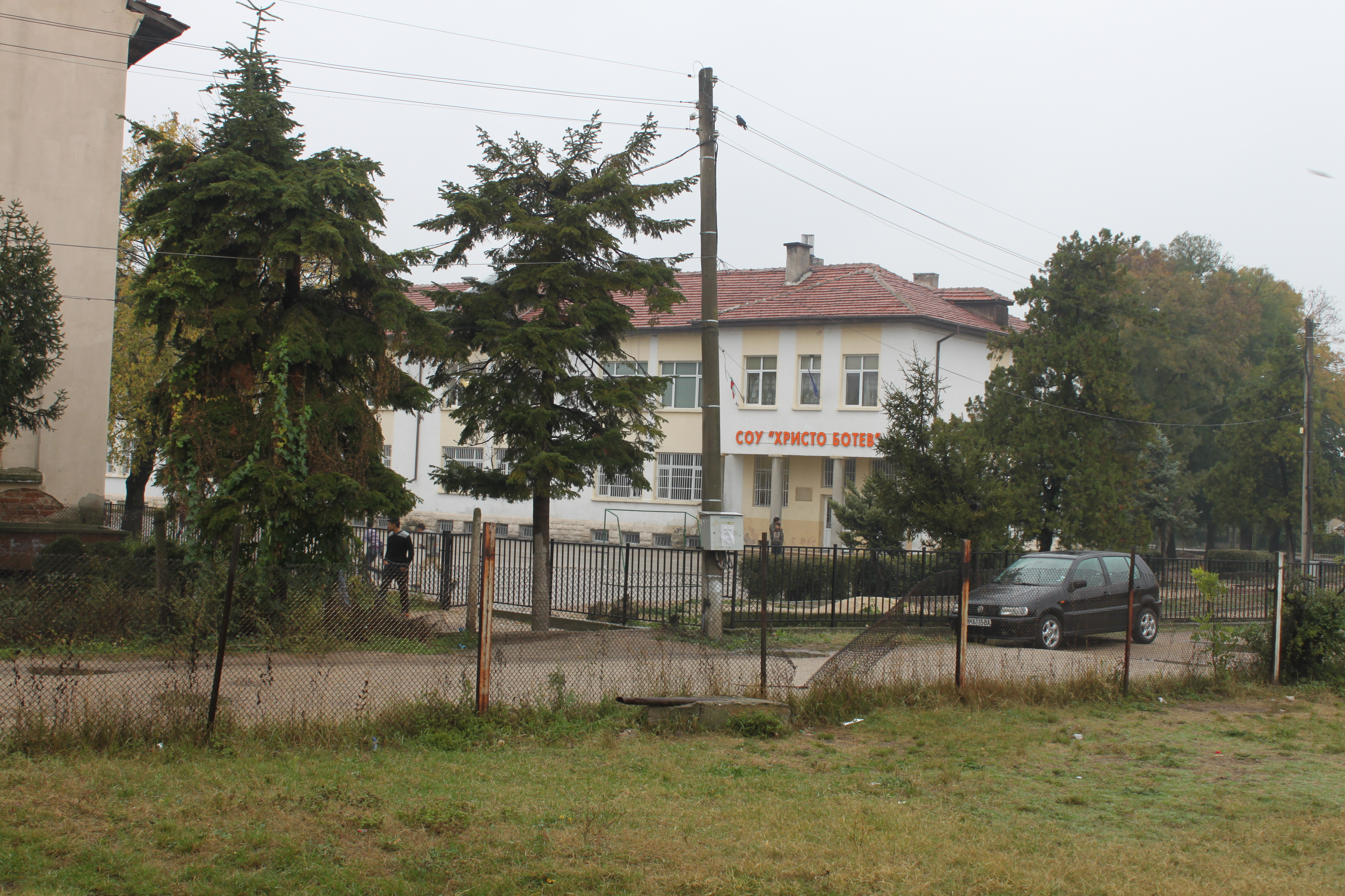 die antike römische Stadt Ratiaria; bei Archar an der Donau - östlich von Widin; das ca. 2 x2 km große Gelände wurde von Schatzsuchern monatelang systematisch mit Baggern umgegraben und druchsiebt, so dass alle archäologischen Schichten und Funde zerstört sind; nur an einer Stelle ist ein gemauerter Bogen übrig geblieben